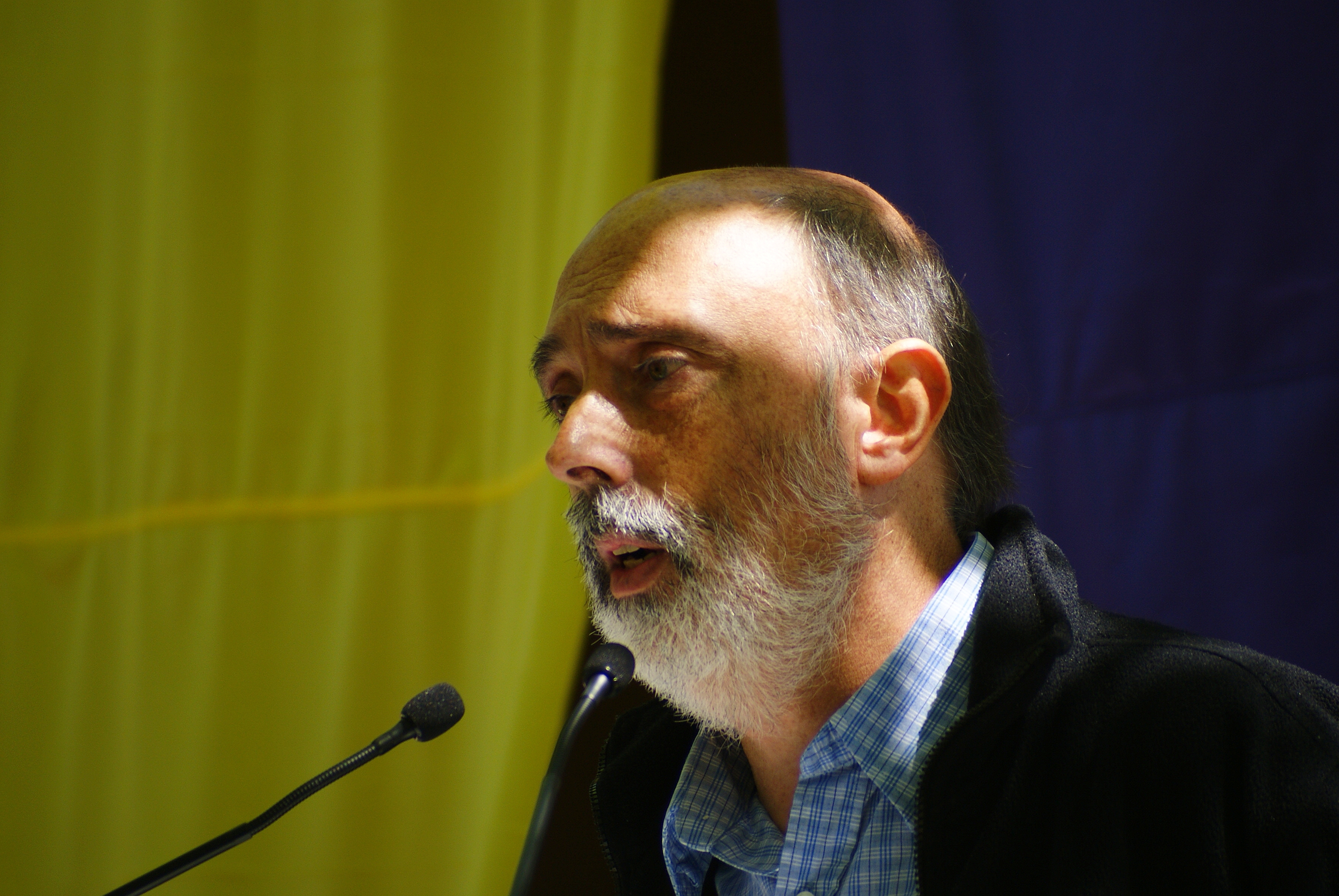 Francisco Etxeberria, antropólogo forense español, durante un acto de la Asociación para la Recuperación de la Memoria Histórica en Palencia.